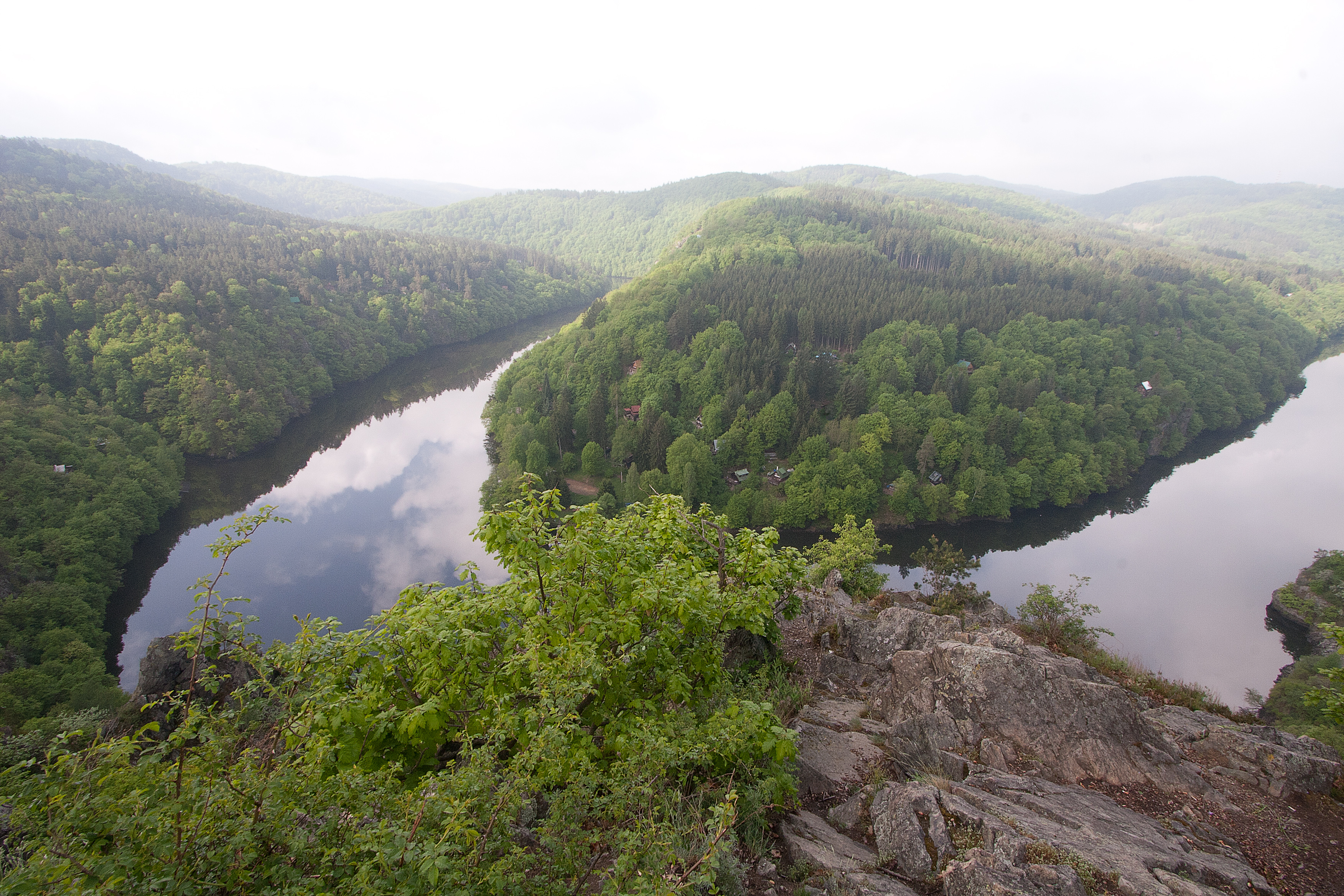 Smetanova vyhlídka květen 2012